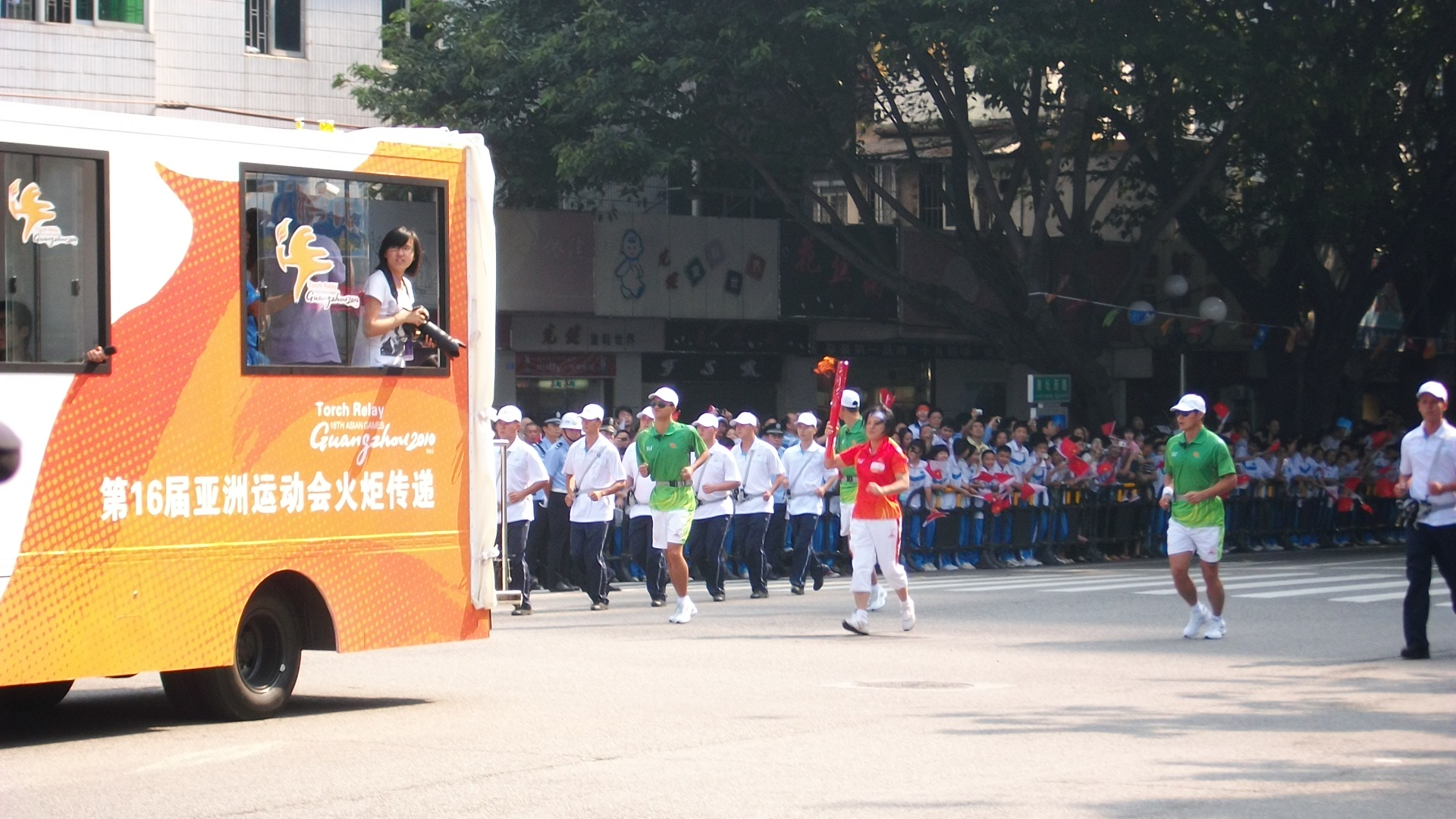 广州亚运会火炬在惠州的传递，图为第25棒火炬手真在传递火炬。